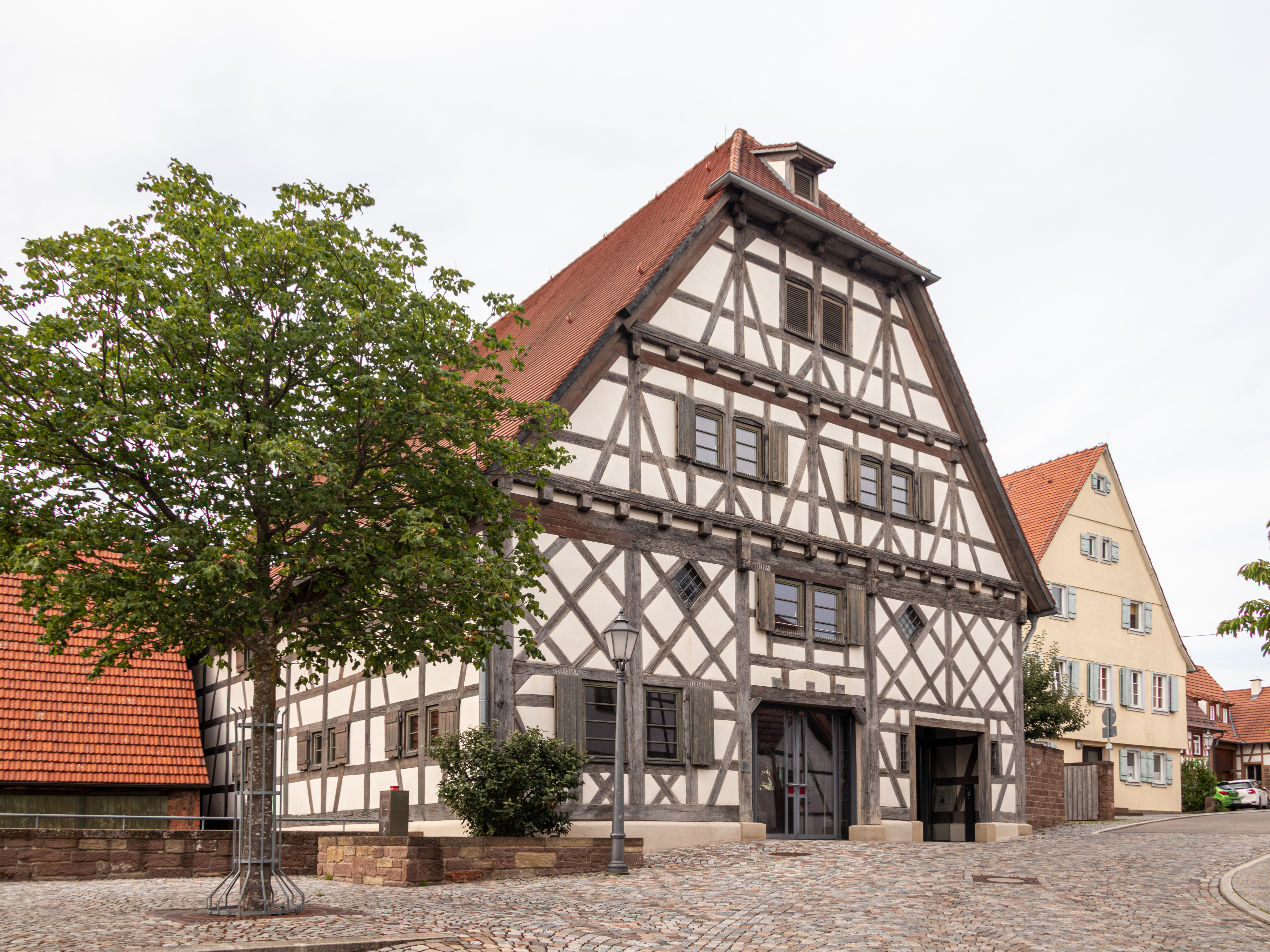 Denkmalgeschütze Alte Kelter in Ötisheim - Giebel zur Schöneberger Straße..